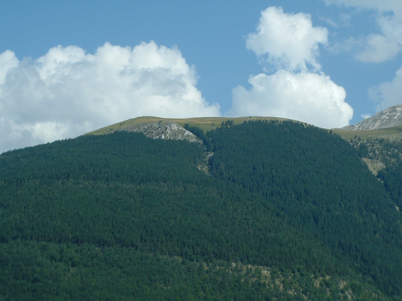 Monte Cornaccione